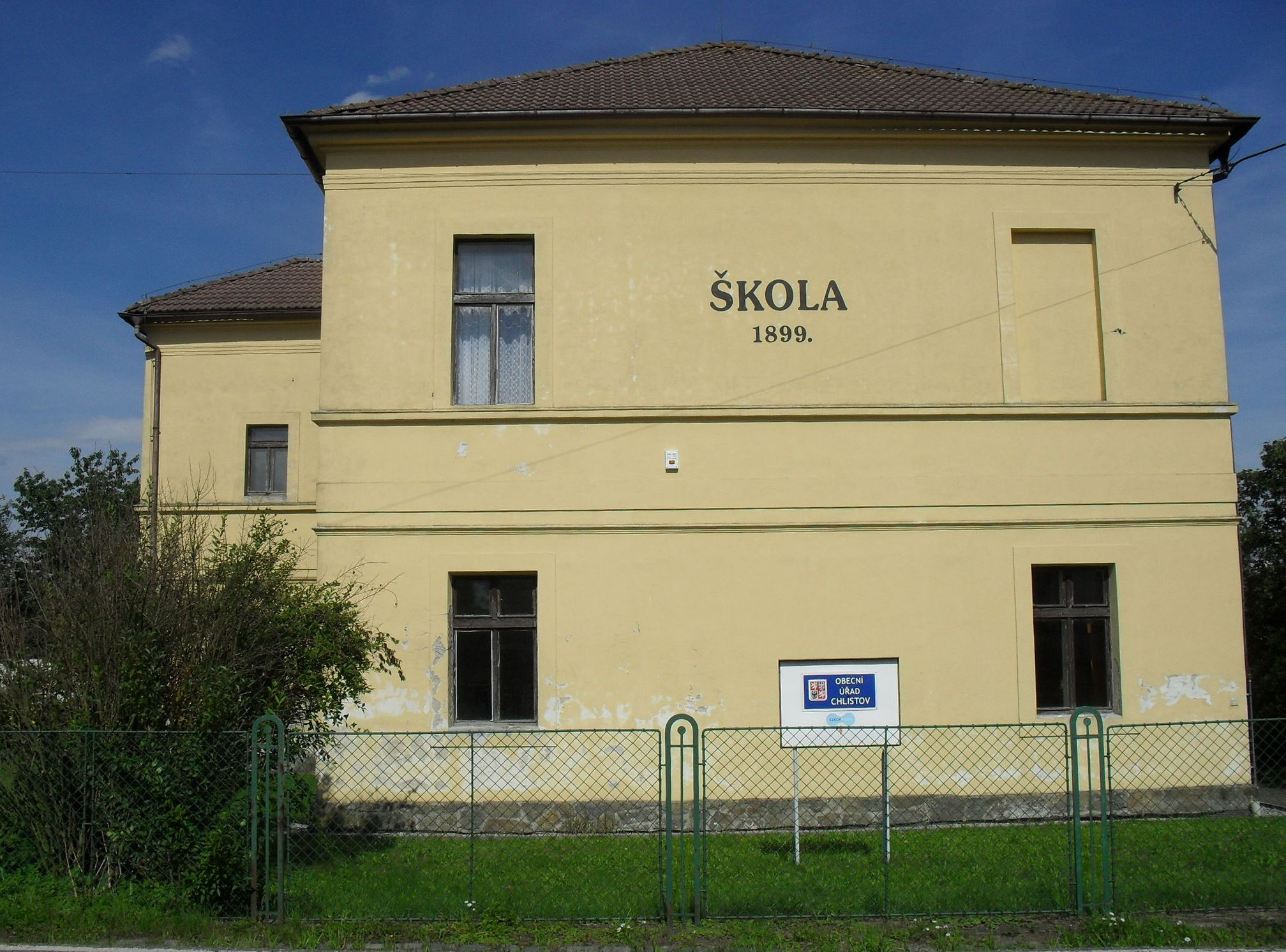 Budova školy v Chlístově, dnes již nesloužící svému účelu